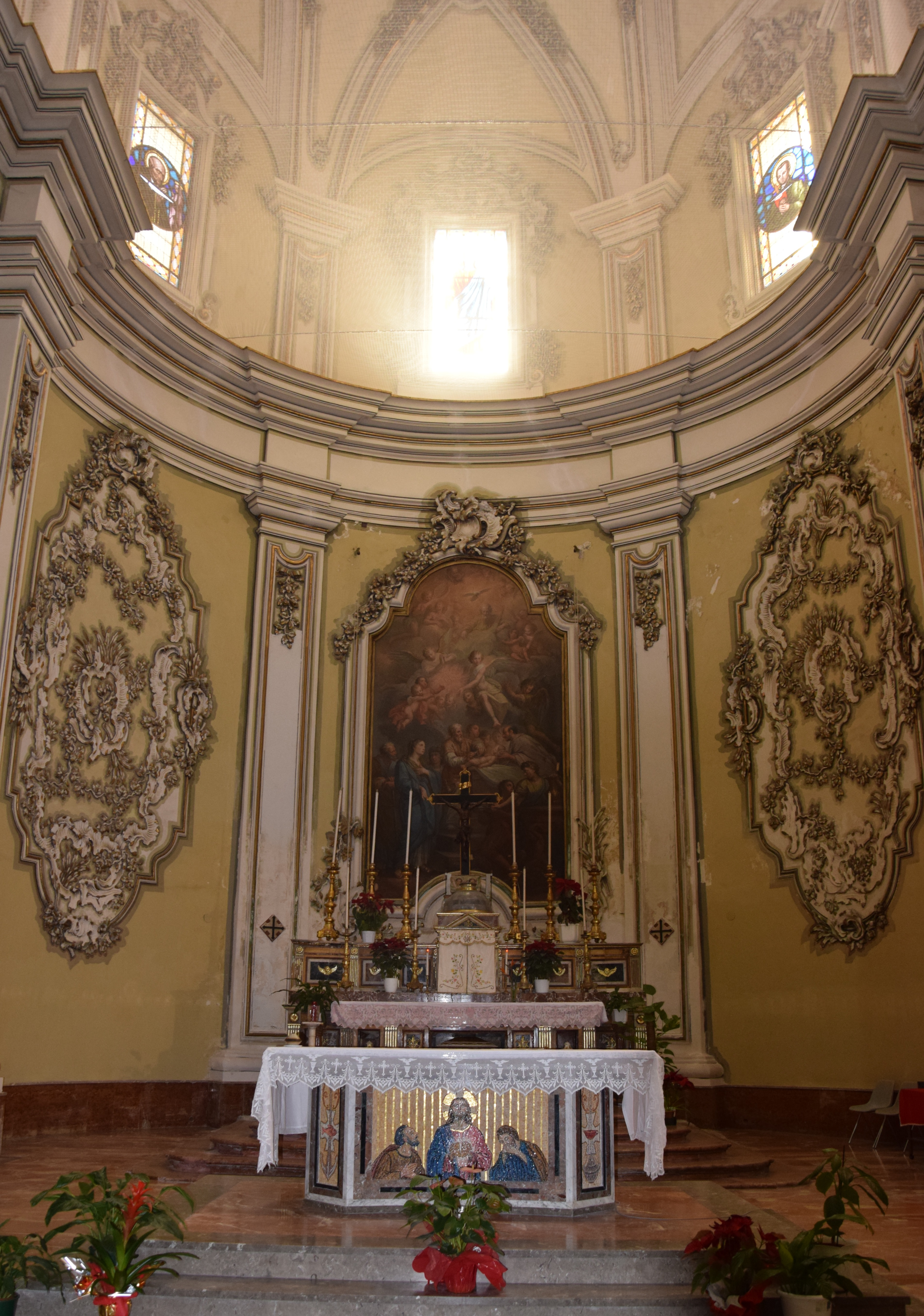 Chiesa del Collegio dei Gesuiti (Alcamo)